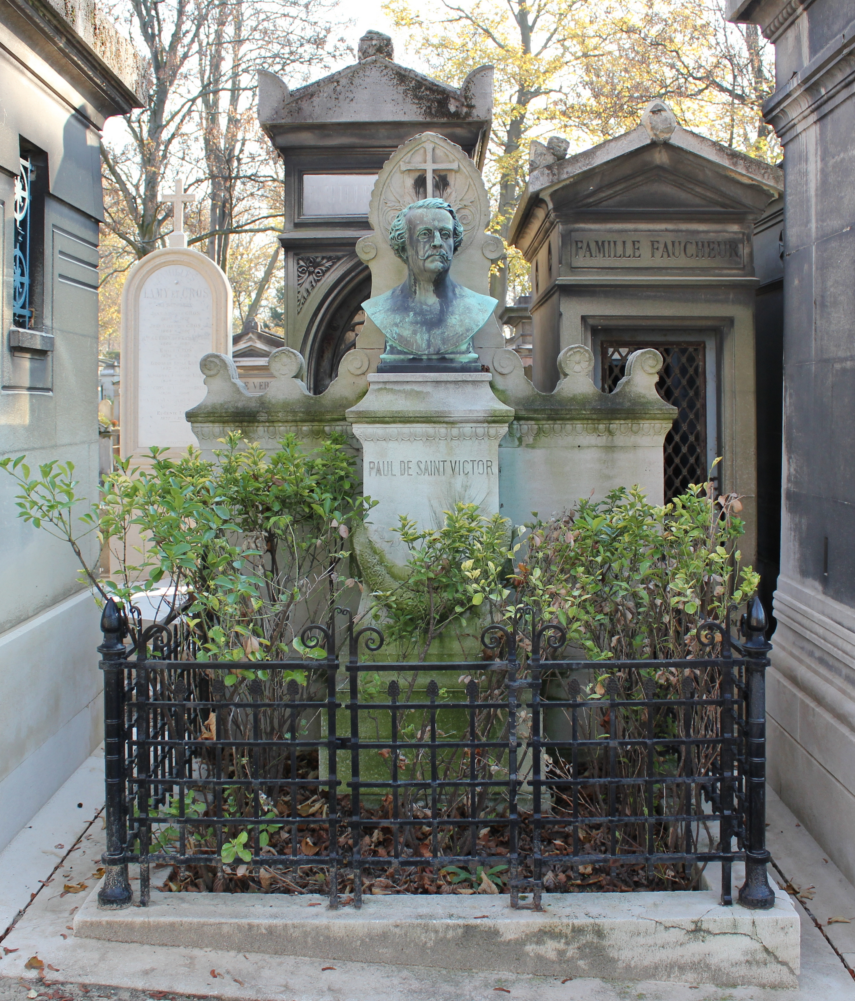 vue générale, face avant